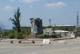 Памятник Н. Гикало, А. Шерипову, Г. Ахриеву